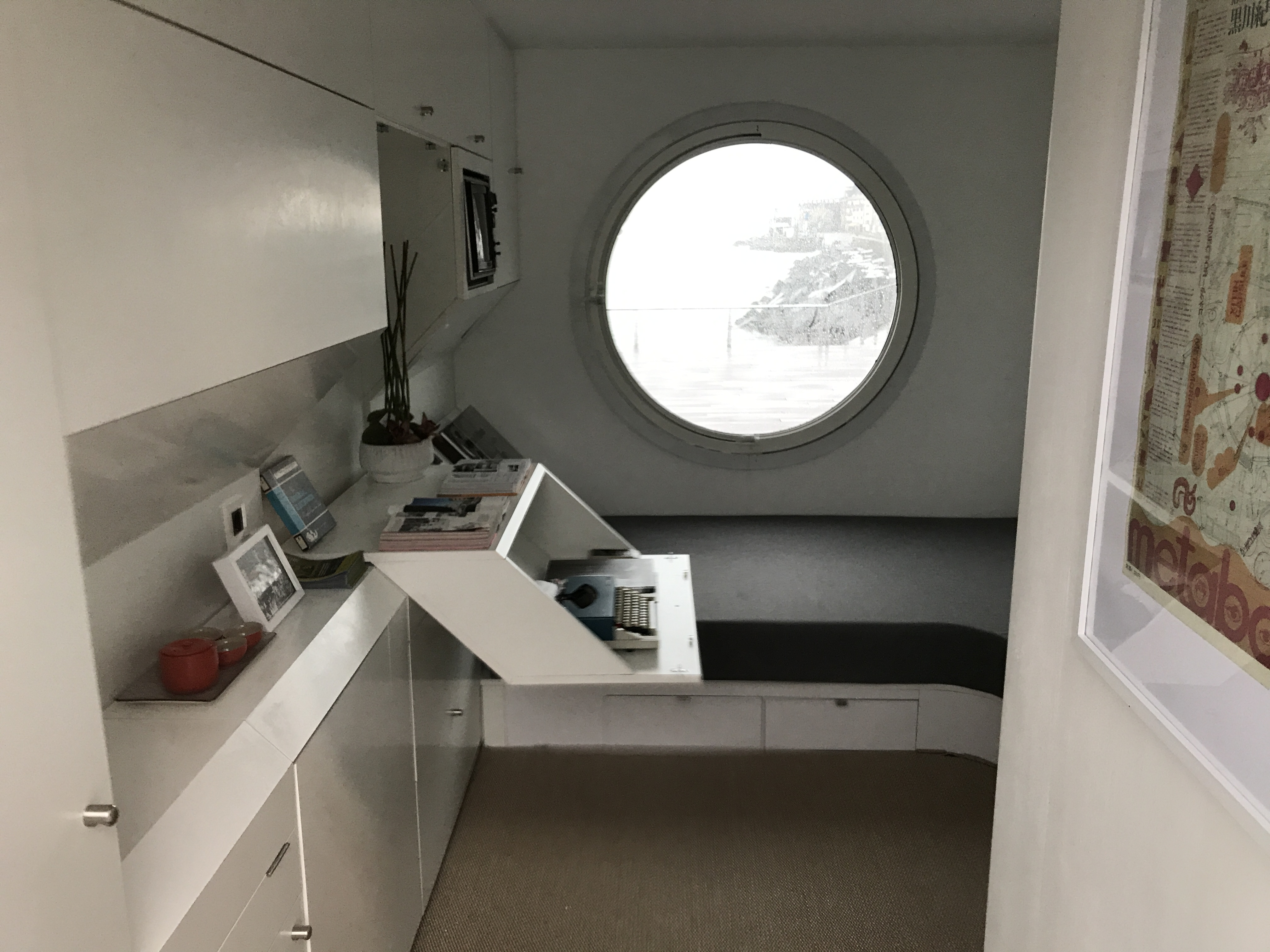 Nakagin kapsula erreplika Donostia 2019 Mugak 01